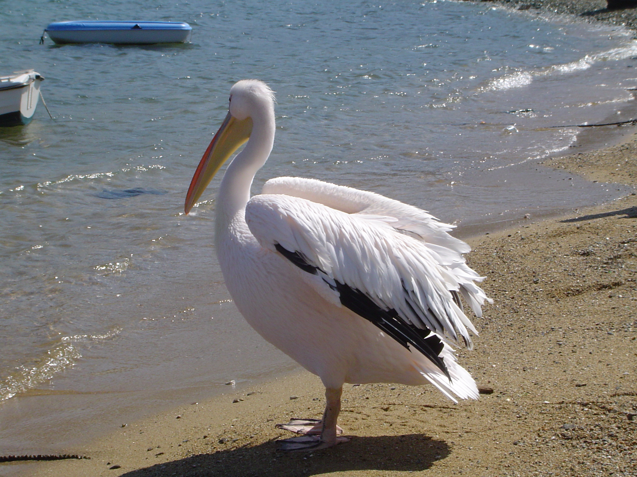 D'Maskotte, de Petros (2005).